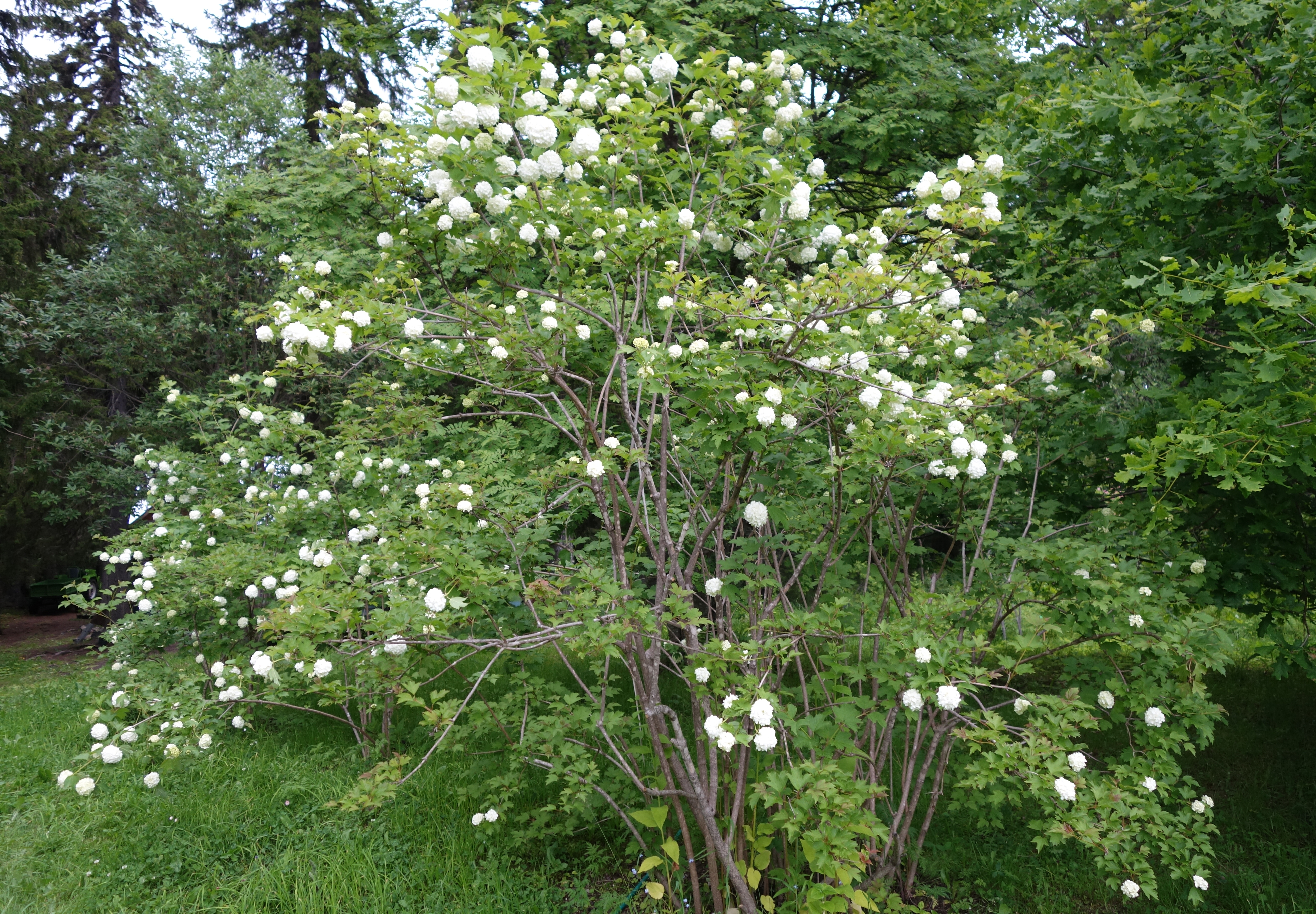 Сад ботанический: северо-западная часть, 4 км от поселка, Остров Большой Соловецкий, Соловецкий район, Архангельская область